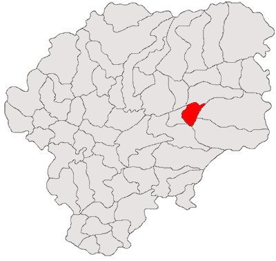 Categorie:Hărţi ale judeţului Bistriţa-Năsăud